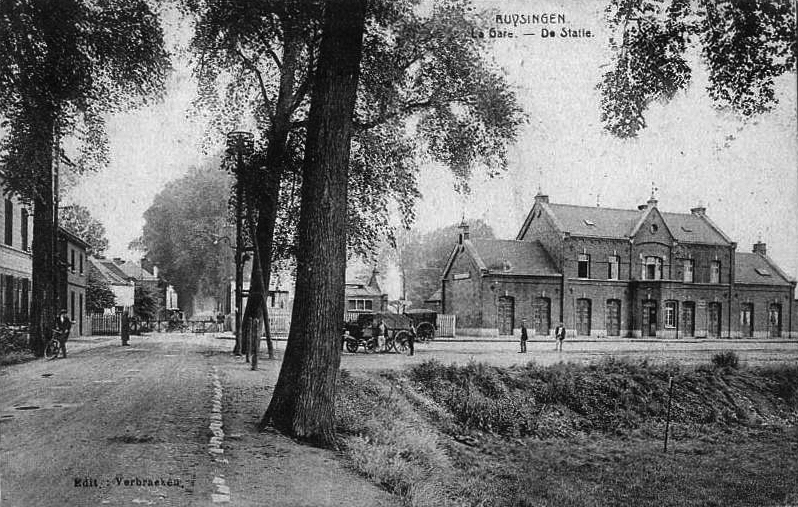 La gare de Buizingen, avec son bâtiment voyageurs, vers 1900.